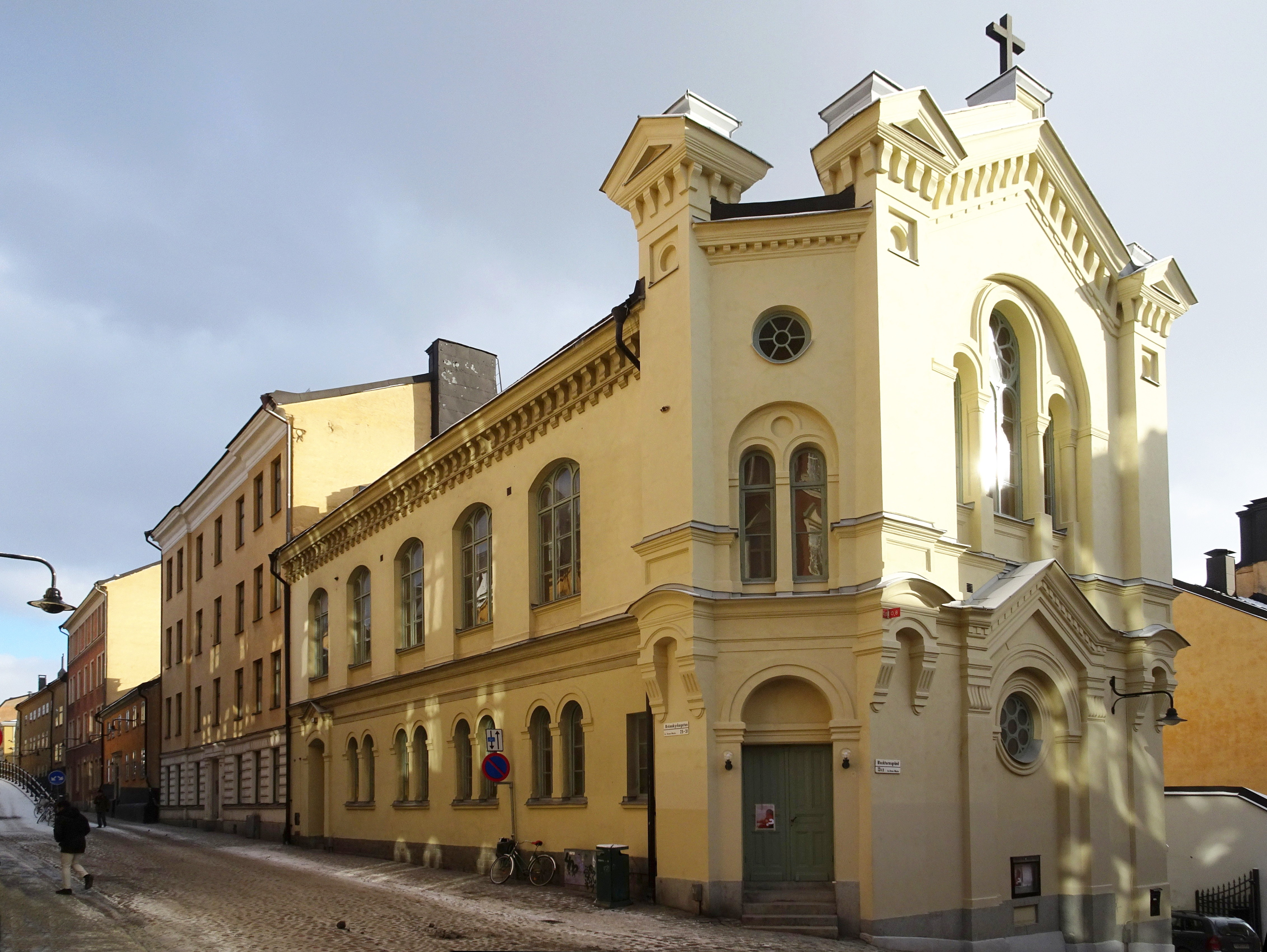 Ebeneserkyrkan, Stockholm (Söderhöjdskyrkan)